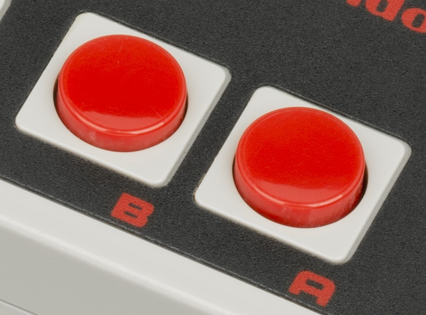 Botões de face do controle do Nintendo Entertainment System.